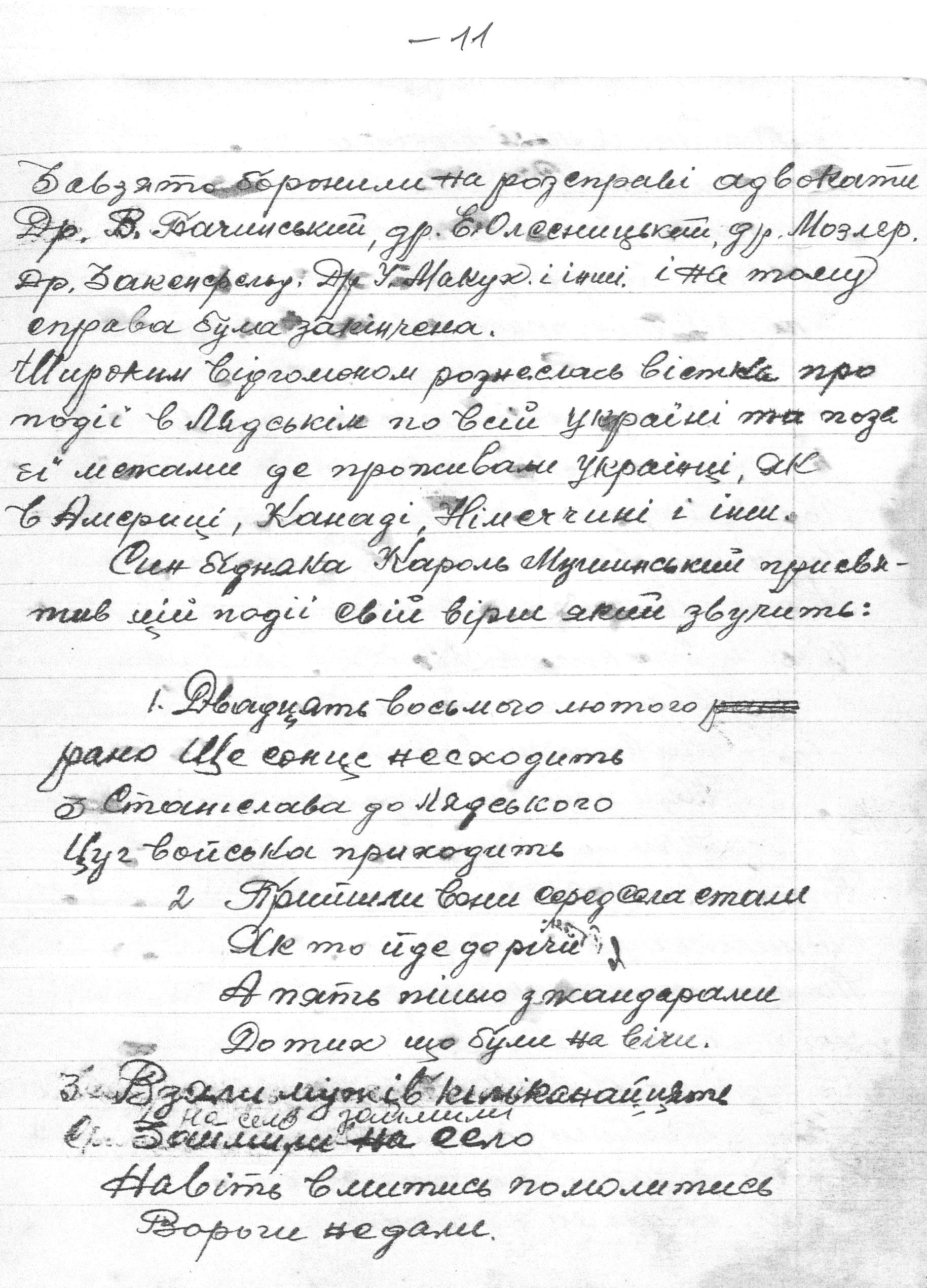 Копія рукопису